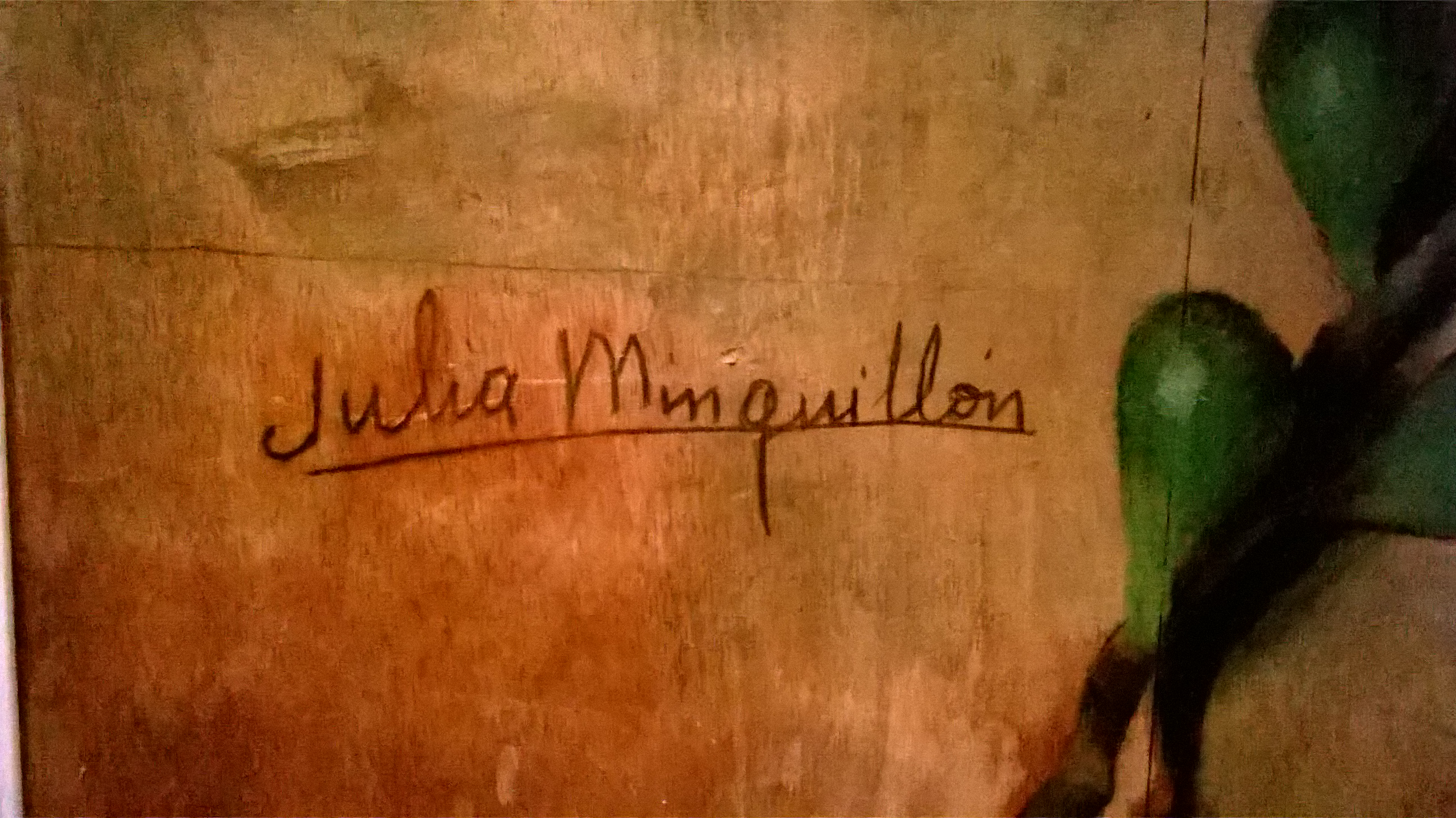 Sinatura de Xulia Minguillón